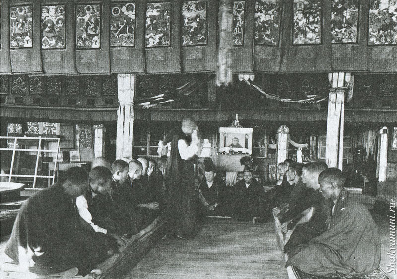 Фото начала 1920-х.